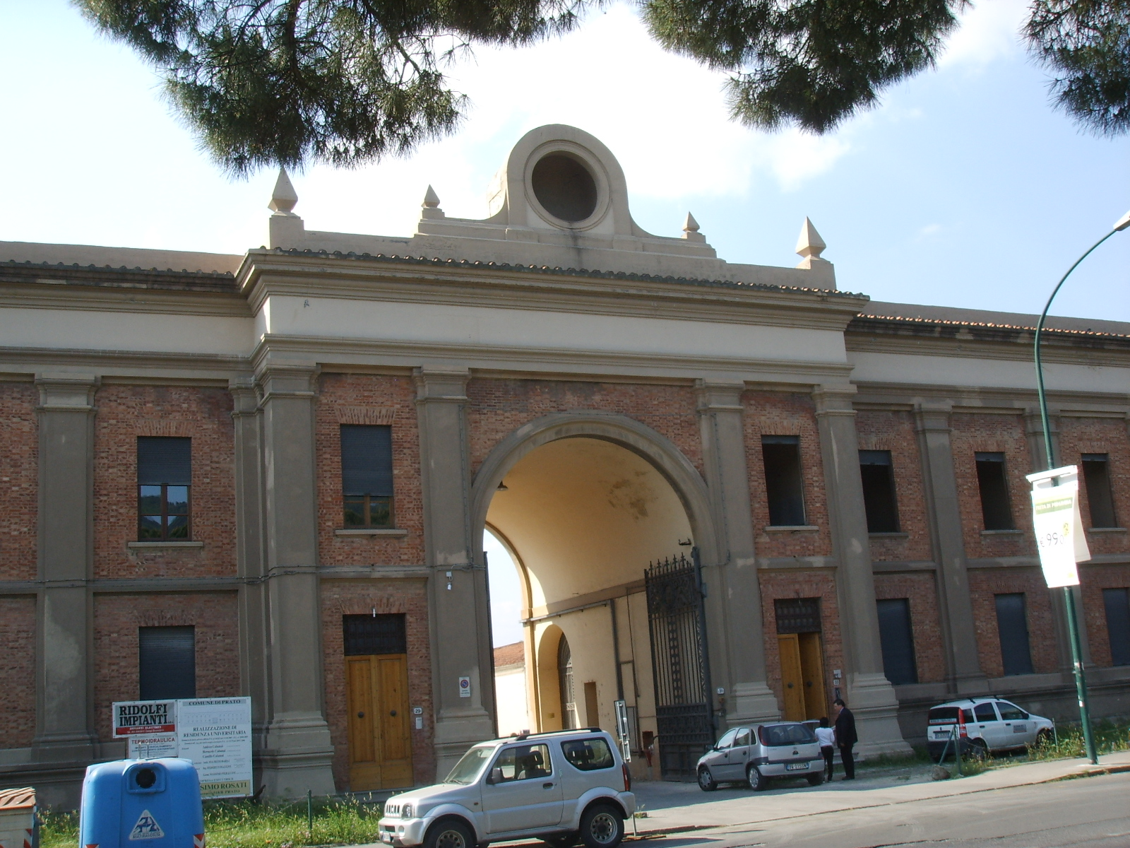 L'ex lanificio Figli di Michelangelo Calamai I° in viale Galilei a Prato.